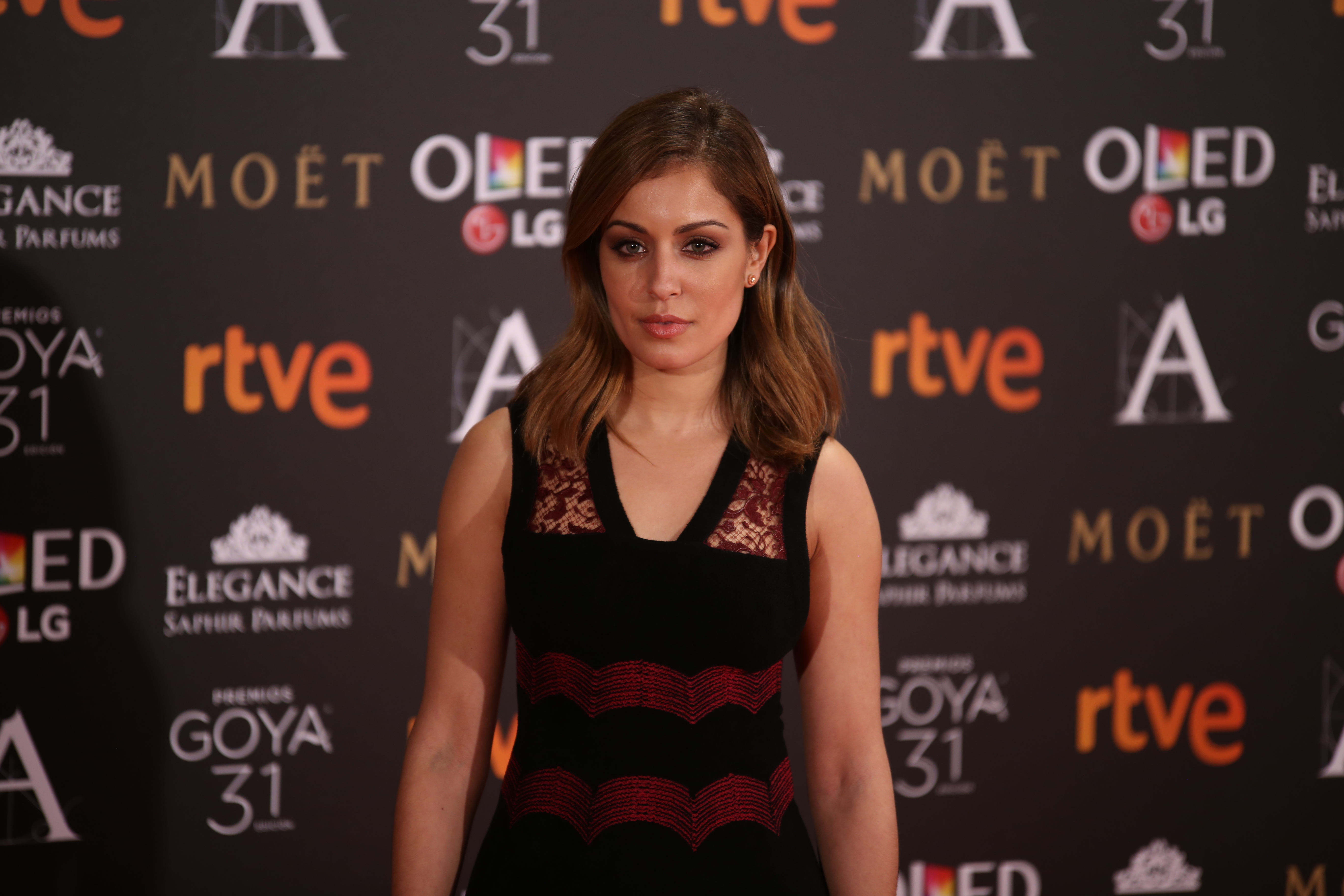 Premios Goya 2017